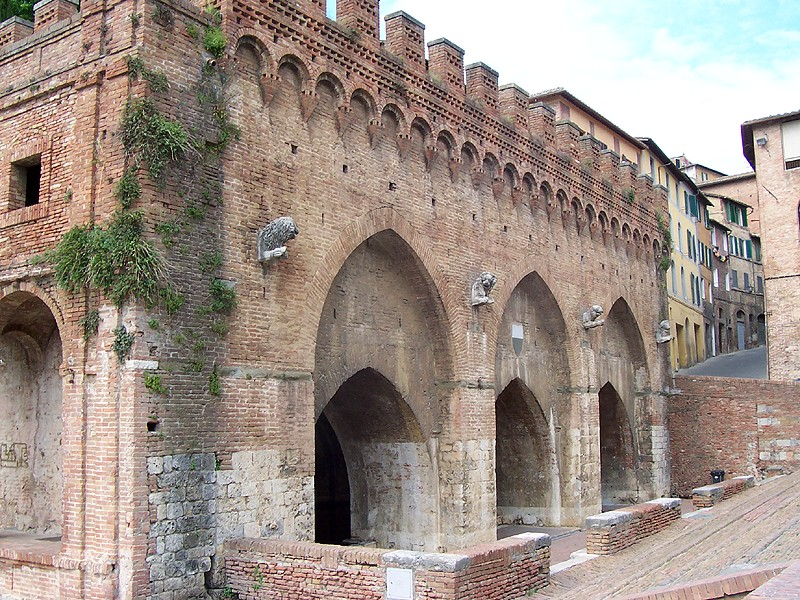 Siena - Fonte Branda